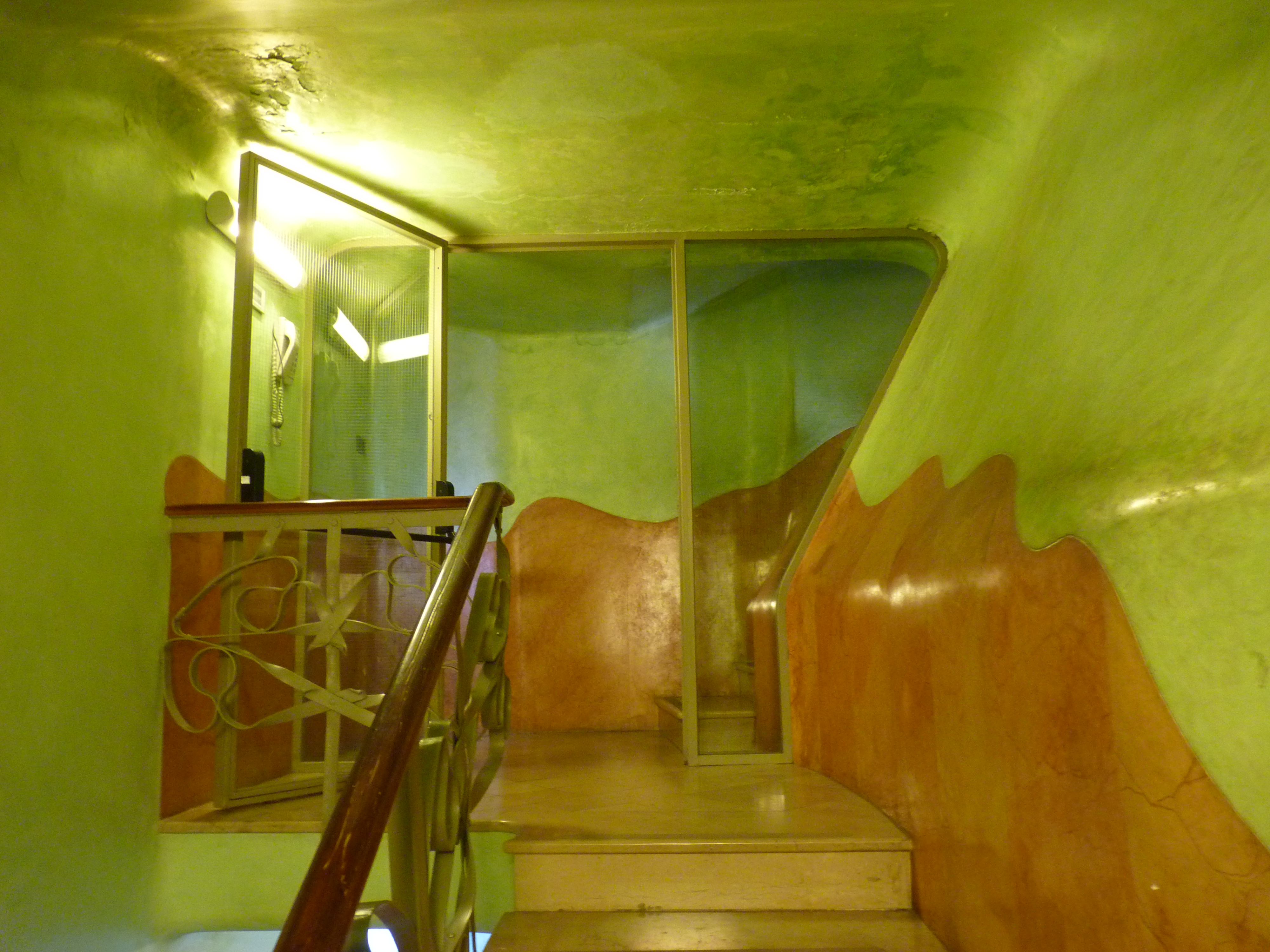 Casa Milà (la Pedrera), Barcelona